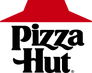 Pizza Hut's old logo